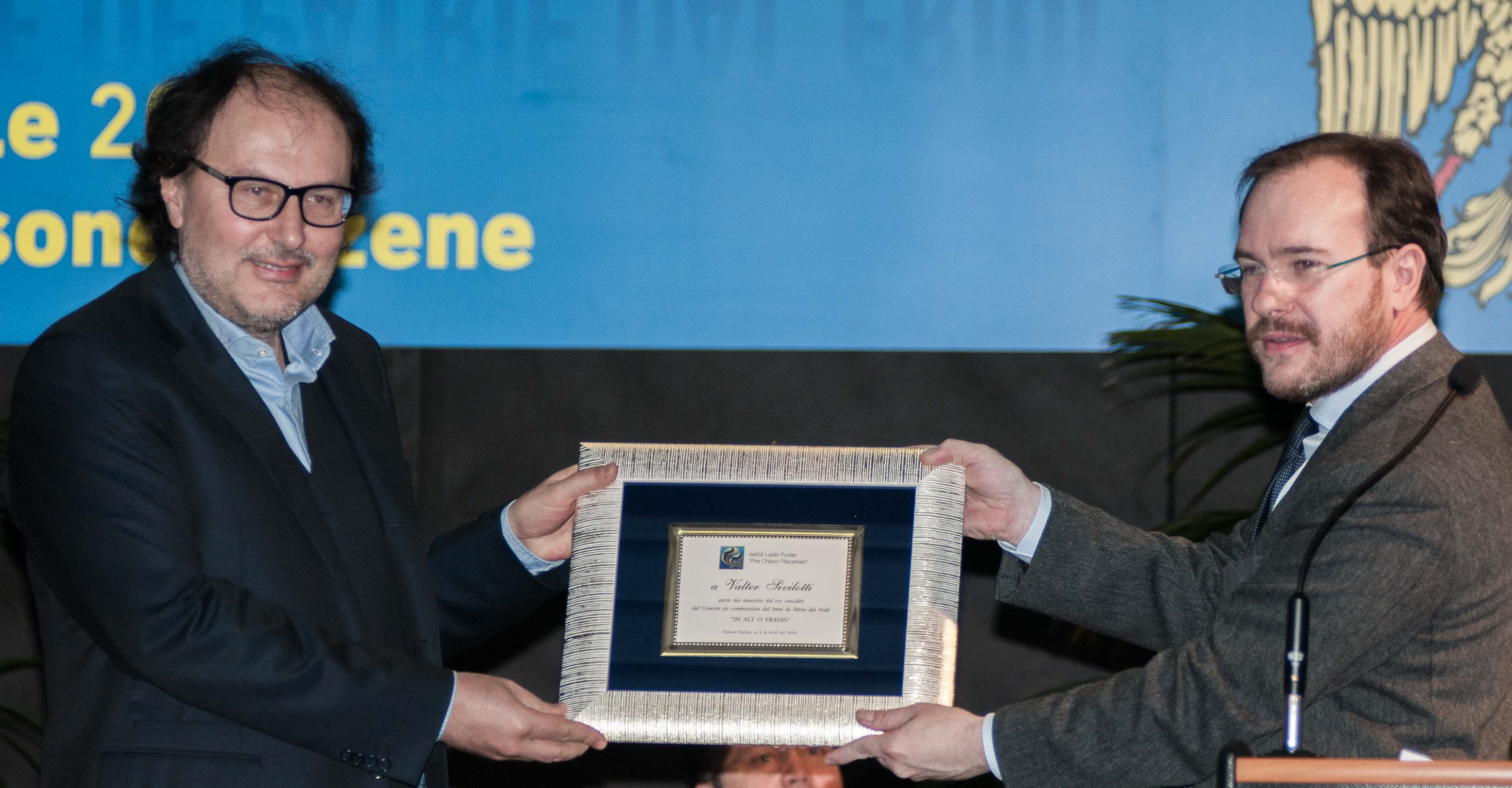 Premiazione Sivilloti